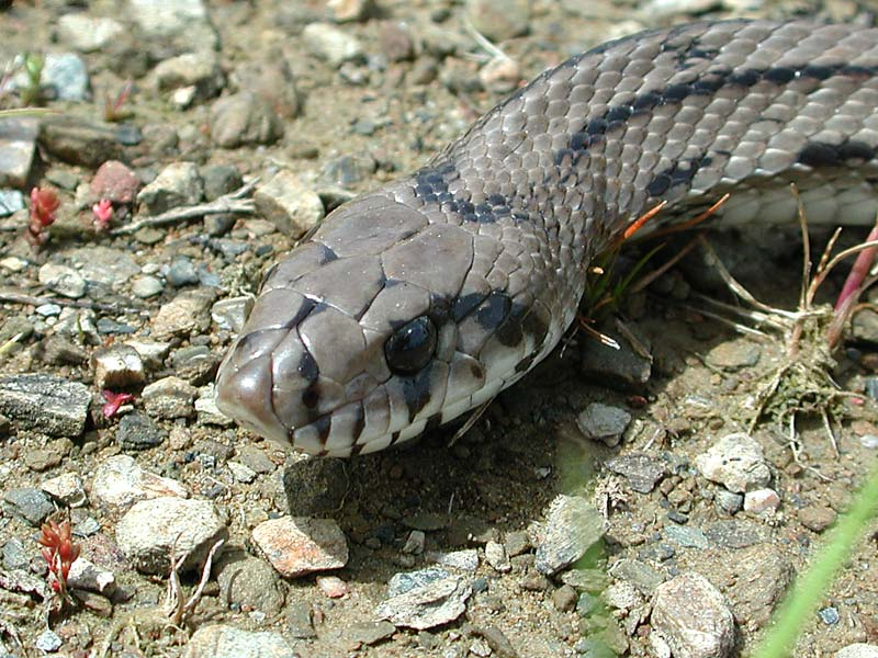 Couleuvre à échelons (Tête) - Ladder Snake (Elaphe scalaris) in Monfragüe - Extramadure - ESPAGNE